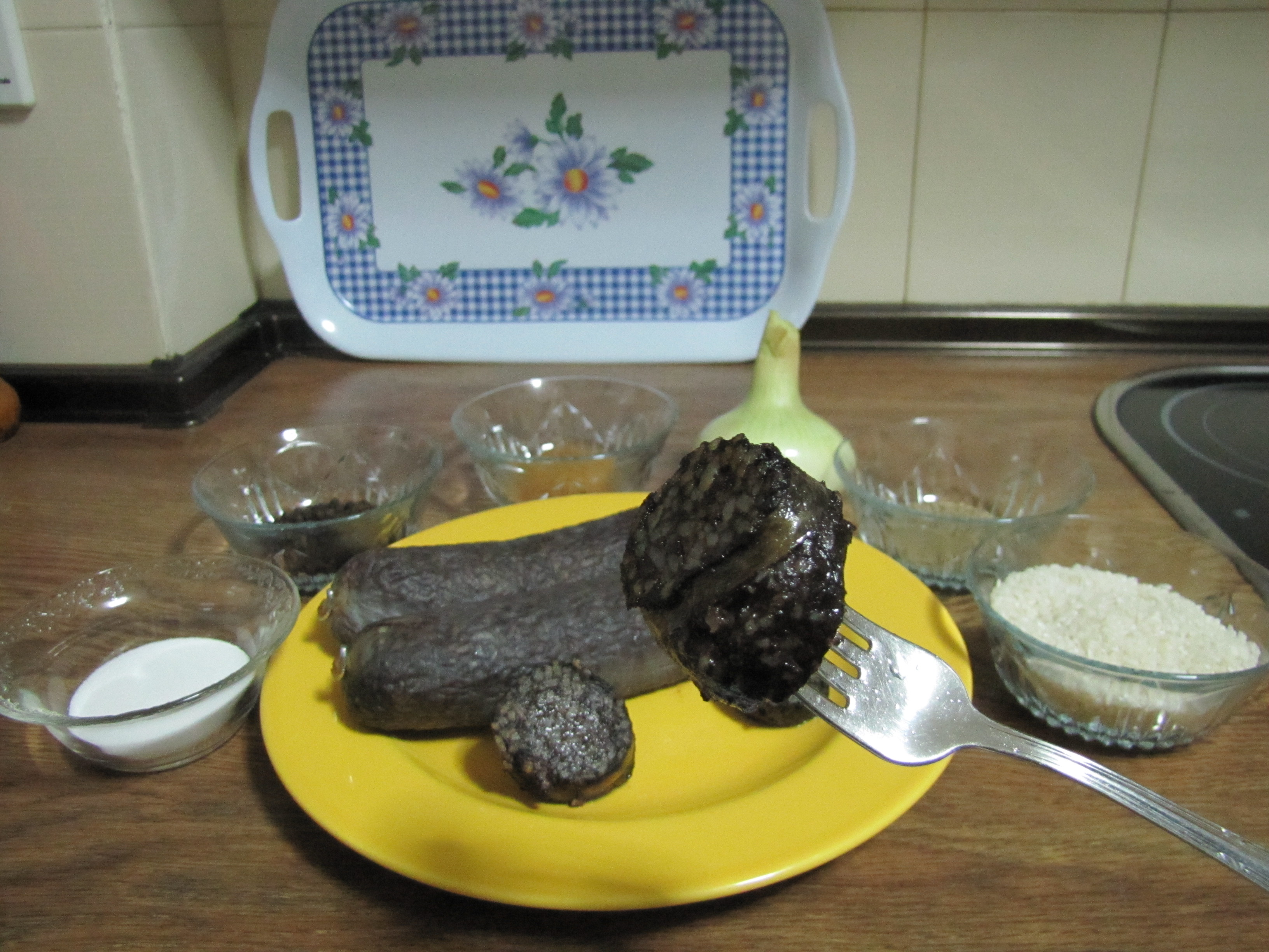 Morcilla de Aranda (Morcilla de Burgos) frita, rodeada de algunso de sus ingredientes: cebolla, arroz, pimienta negra, comino, canela y sal